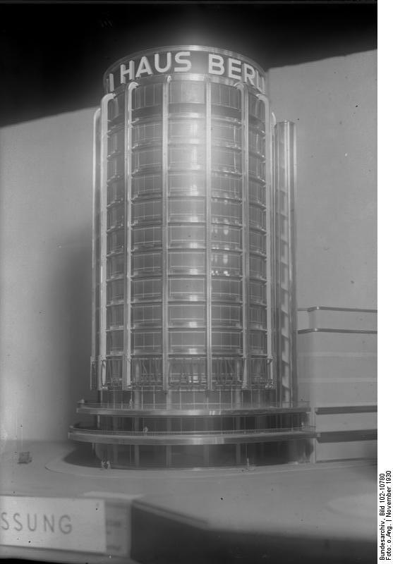 Eine interessante Sonder-Ausstellung im Architektenhaus in Berlin. Das interessante Projekt eines Hochhauses aus Glas von den Berliner Architekten Luckhardt und Anker, dessen Aufstellung man am Potsdamer Platz in Berlin plant.